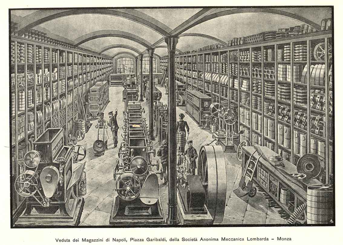 Veduta dell'interno del magazzino di Napoli della Società Anonima Meccanica Lombarda